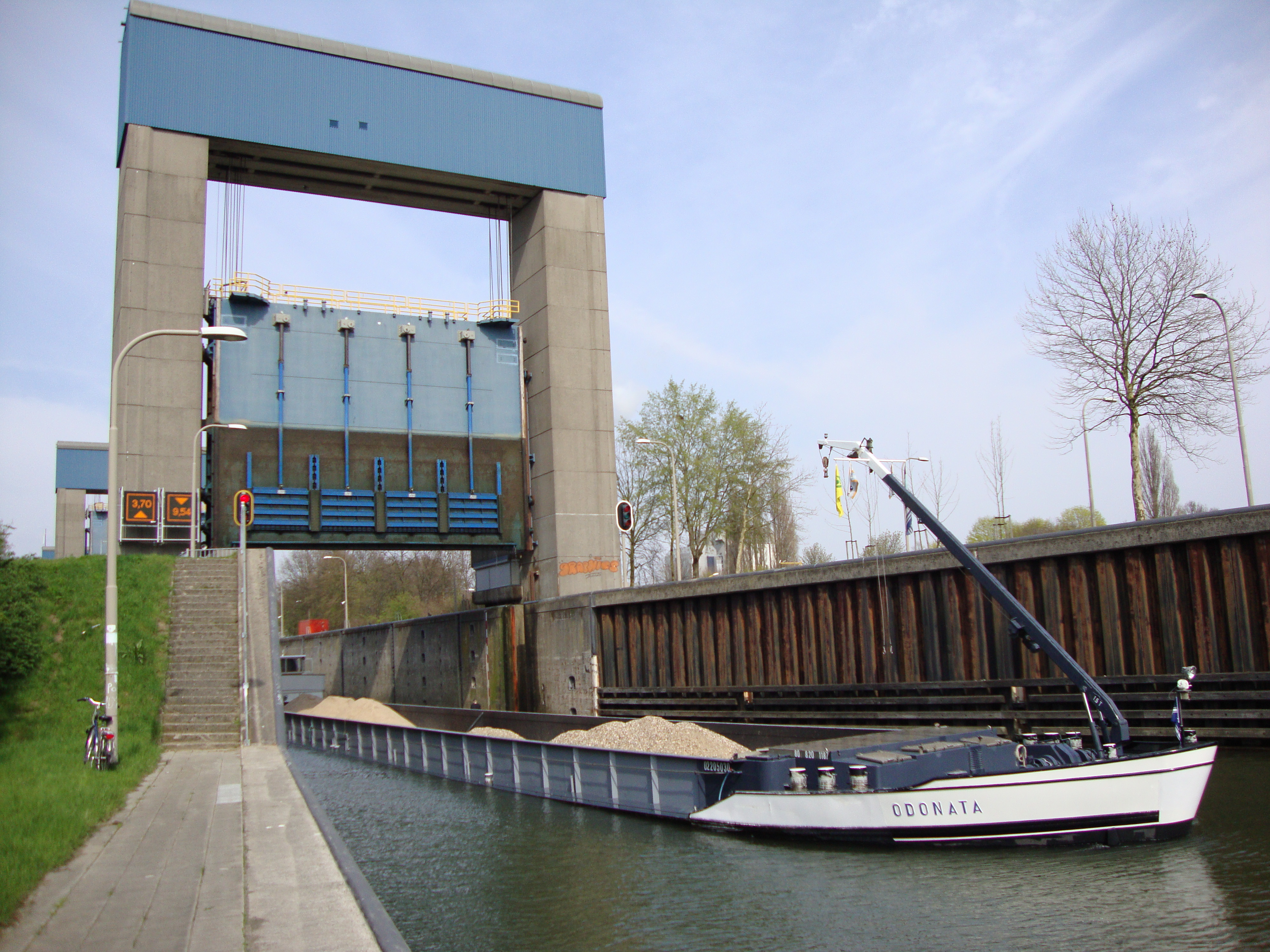 Nijmegen, sluiscomplex Weurt, nieuwe sluis, zuidzijde sluisdeur driekwart open